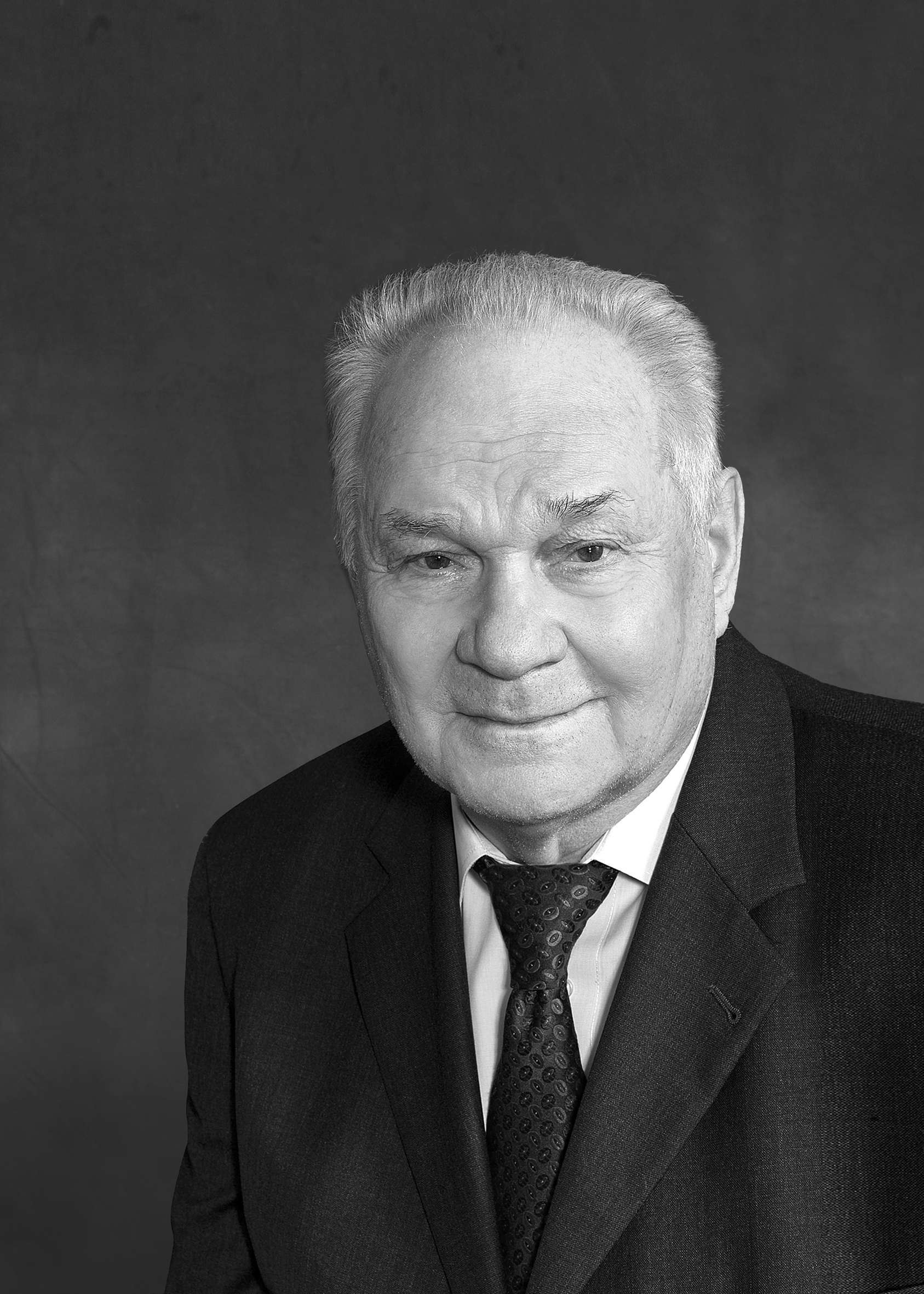 российский советский ученый, специалист в области автоматического управления, академик АН СССР